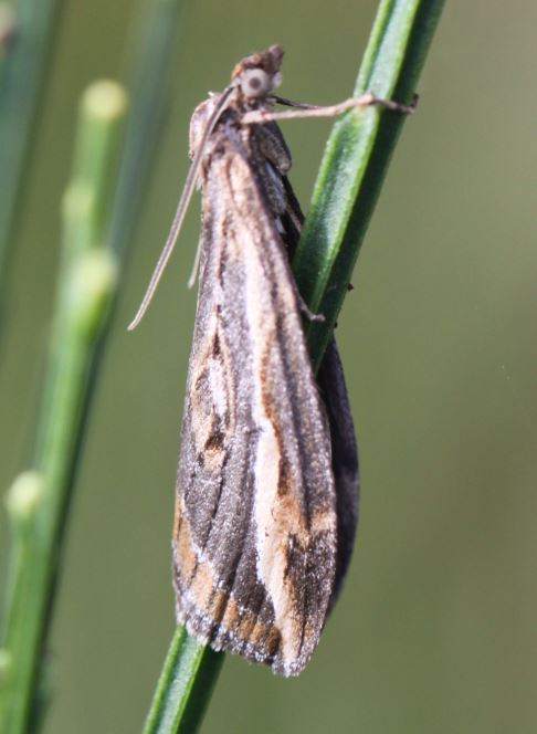 Später Ginsterspanner (Chesias legatella) am 29.10.2016 in der Schwetzinger Hardt